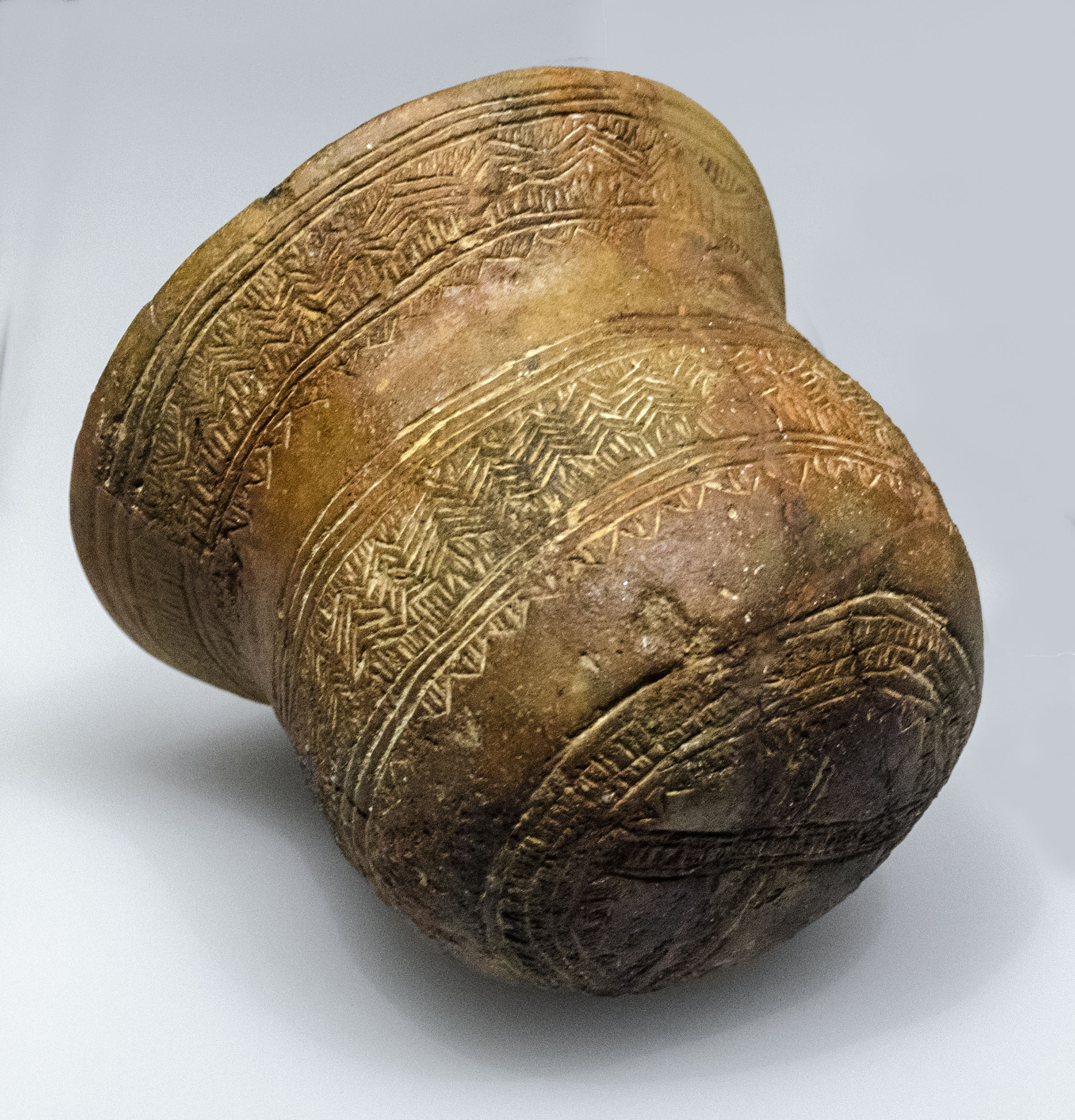 Vaso campaniforme del Bronce Antiguo encontrado en la Cueva de la Fábrica de Harinas de Santibáñez de Ayllón, Segovia. Mide unos 2 cm de altura y diámetro y está hecho de arcilla cocida. La pieza procede de una colección particular donada al MAN en 1940. Está datada en el periodo 2200-1900 a.C.